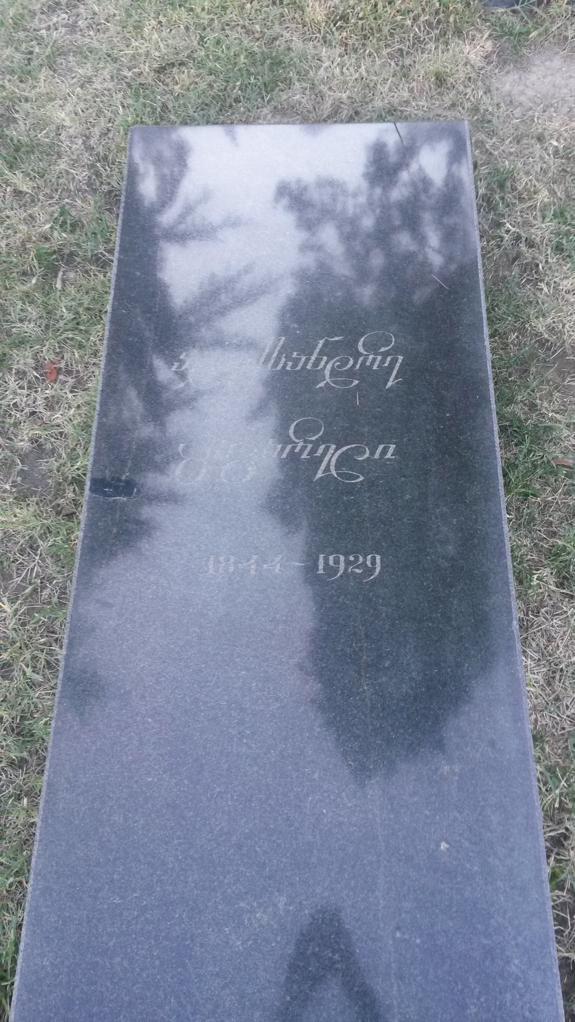 მთაწმინდის პანთეონი